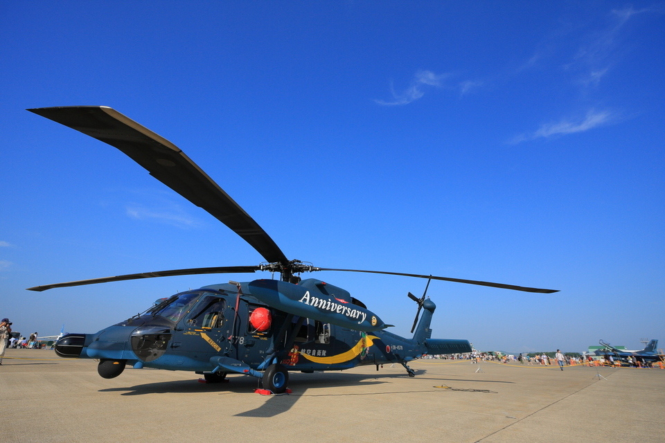 航空自衛隊松島基地航空祭で地上展示された､航空自衛隊松島救難隊のUH-60J 松島救難隊創設５０周年記念塗装機